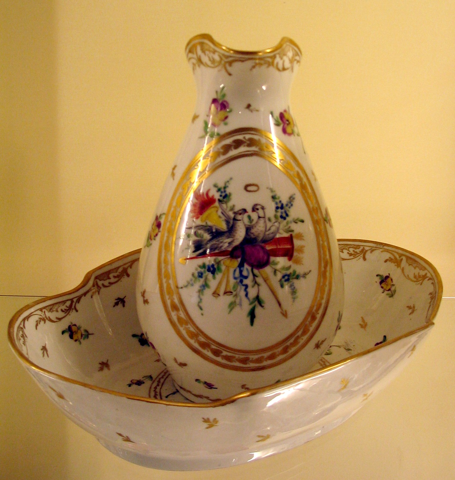 Coupe et pichet en porcelaine de Bordeaux, Musée des arts décoratifs de Bordeaux, France, 1787-1790